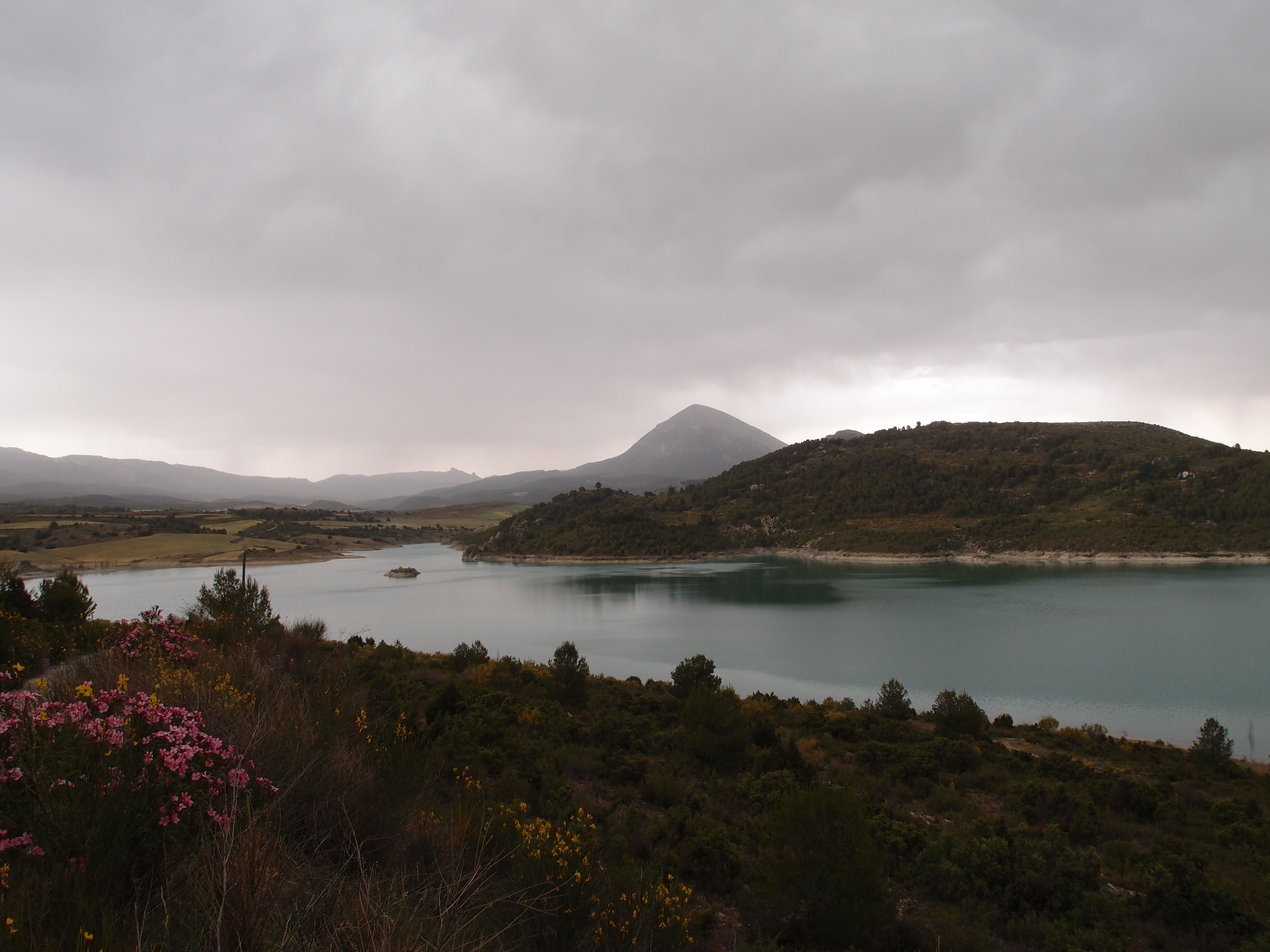 El embalse de San Clemente con la Sagra de fondo.